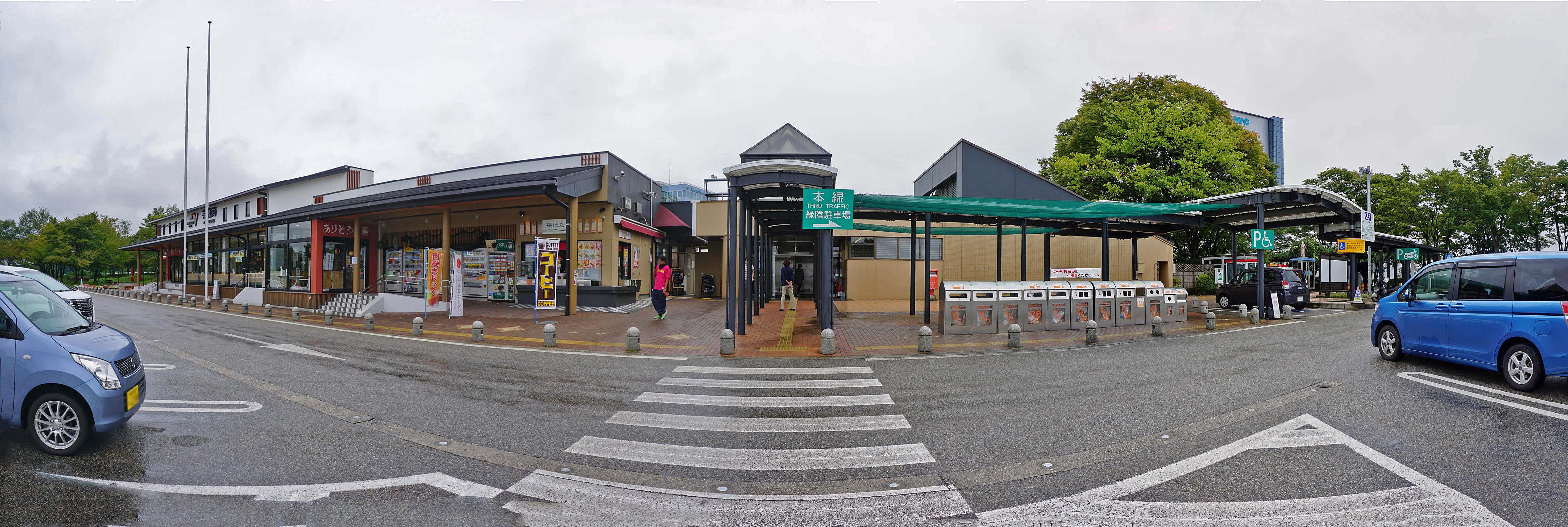 Arisoumi SA , 有磯海SA